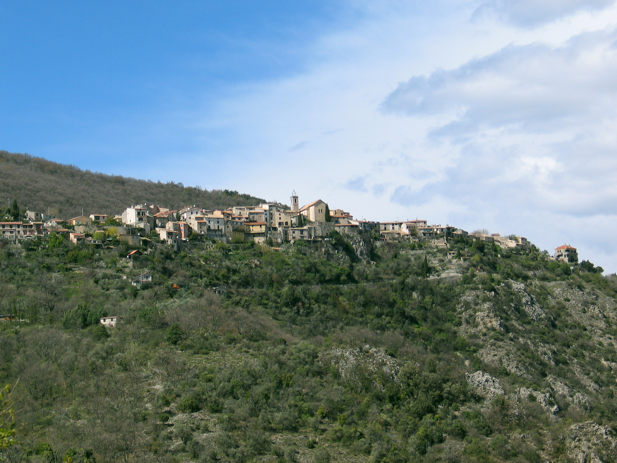 Bouyon, Alpes-Maritimes, France